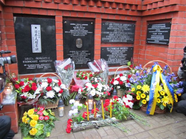 Церемонія відкриття меморіальної дошки Климентію Шептицькому на Князь-Владимирському цвинтарі у Владимирі 30 жовтня 2010 року.